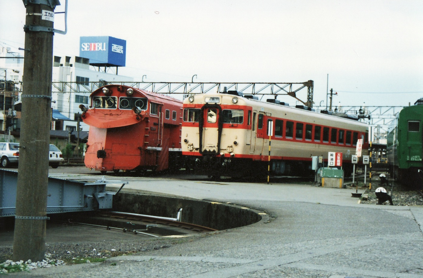 糸魚川列車区（1989年8月19日）